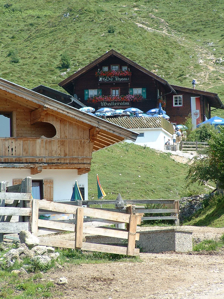 Walleralm (1.170 m) im Kaisergebirge